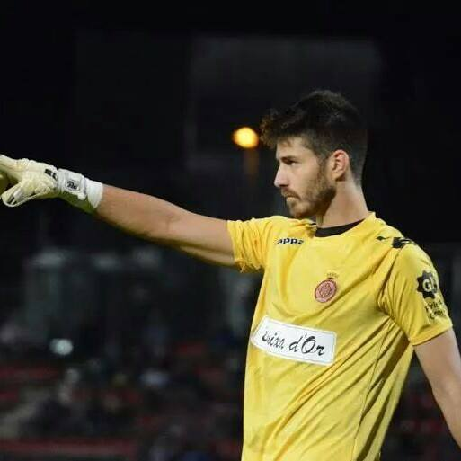 Jorge Palatsi jugando un partido con el Girona Fútbol Club